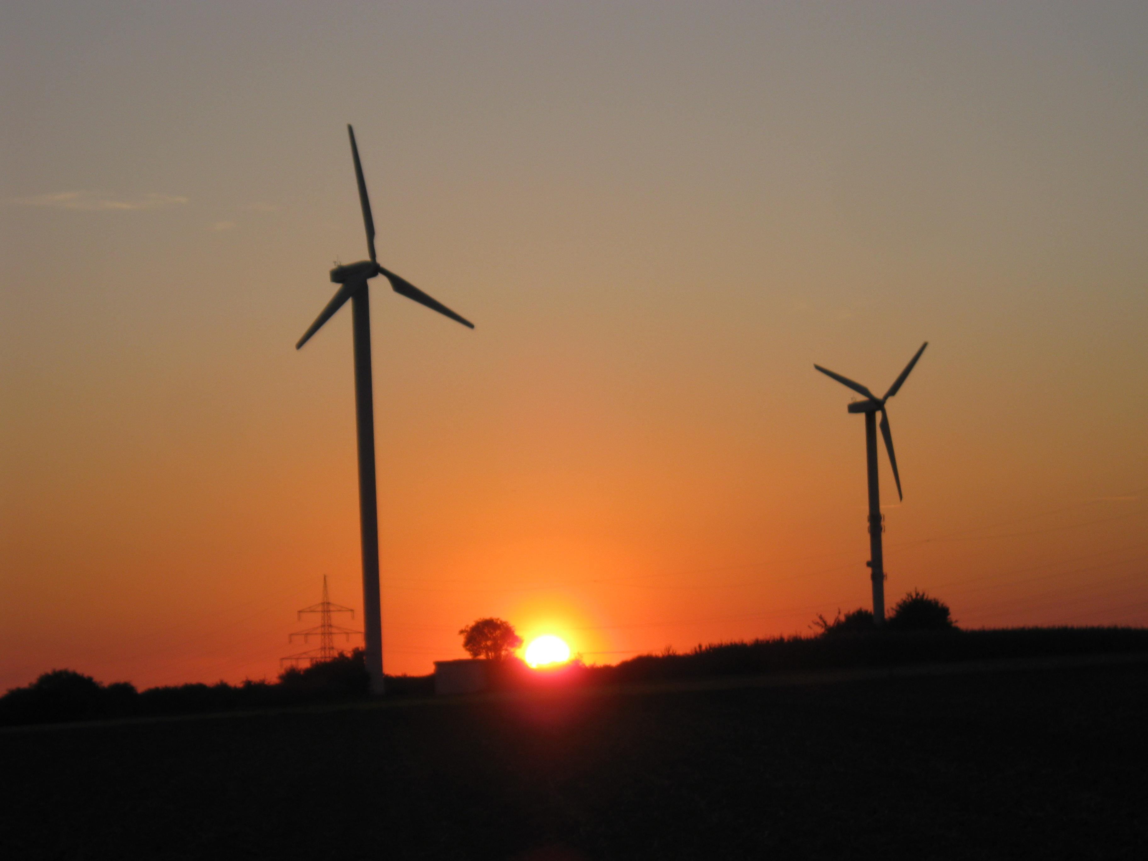 Die beiden Windräder in Oberjettingen